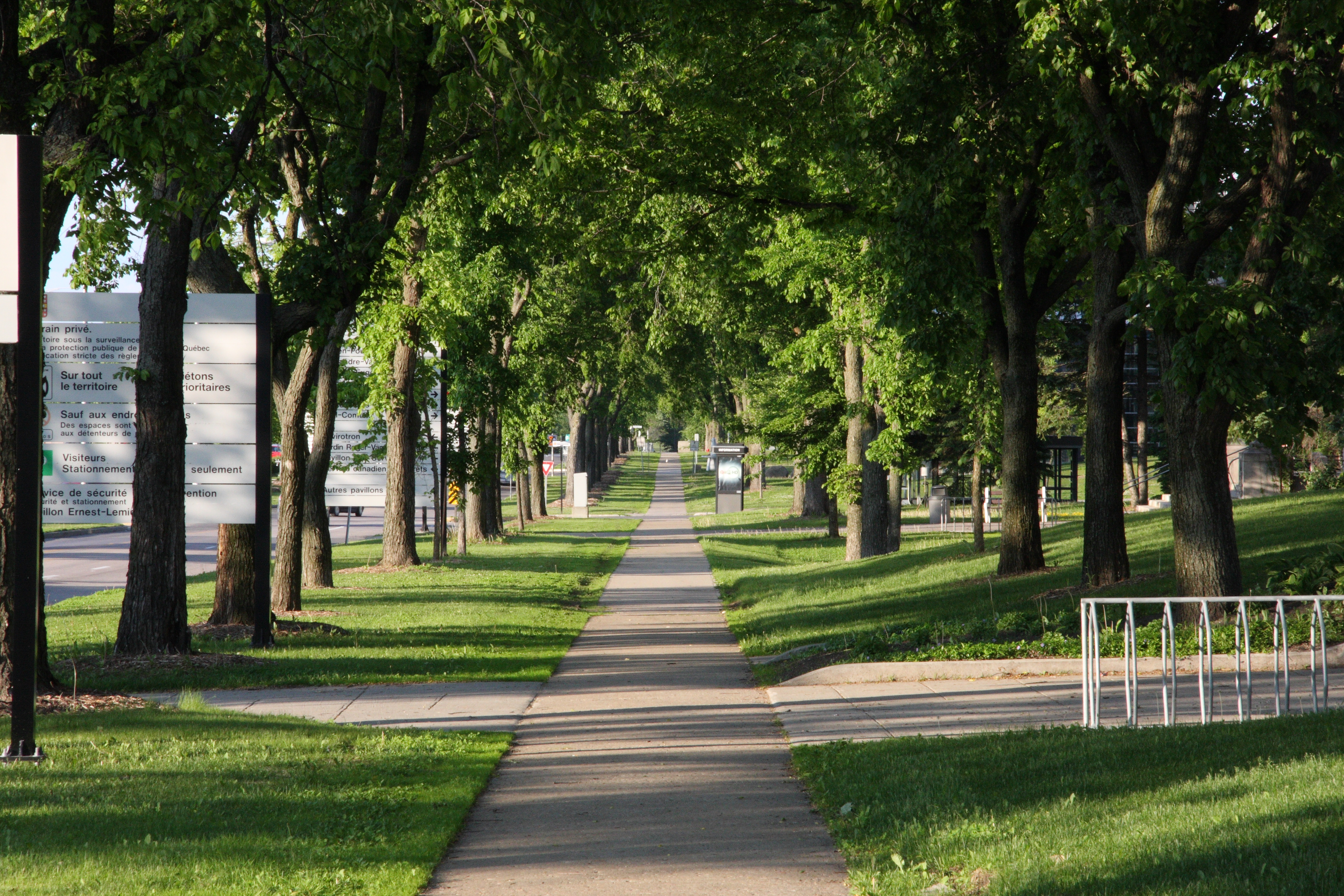 Trottoir le long de la rue de la Terrasse à l'Université Laval